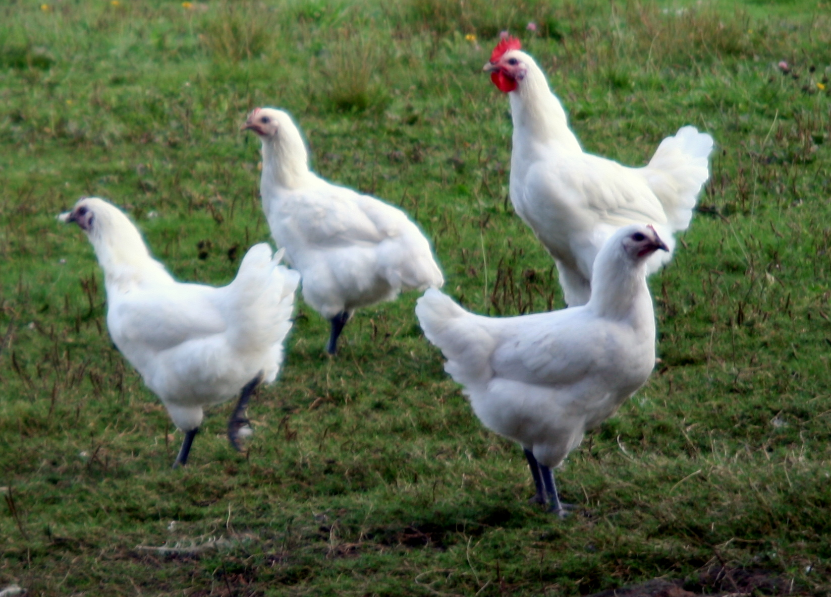 Bressehühner - ein Mann mit drei Weibern